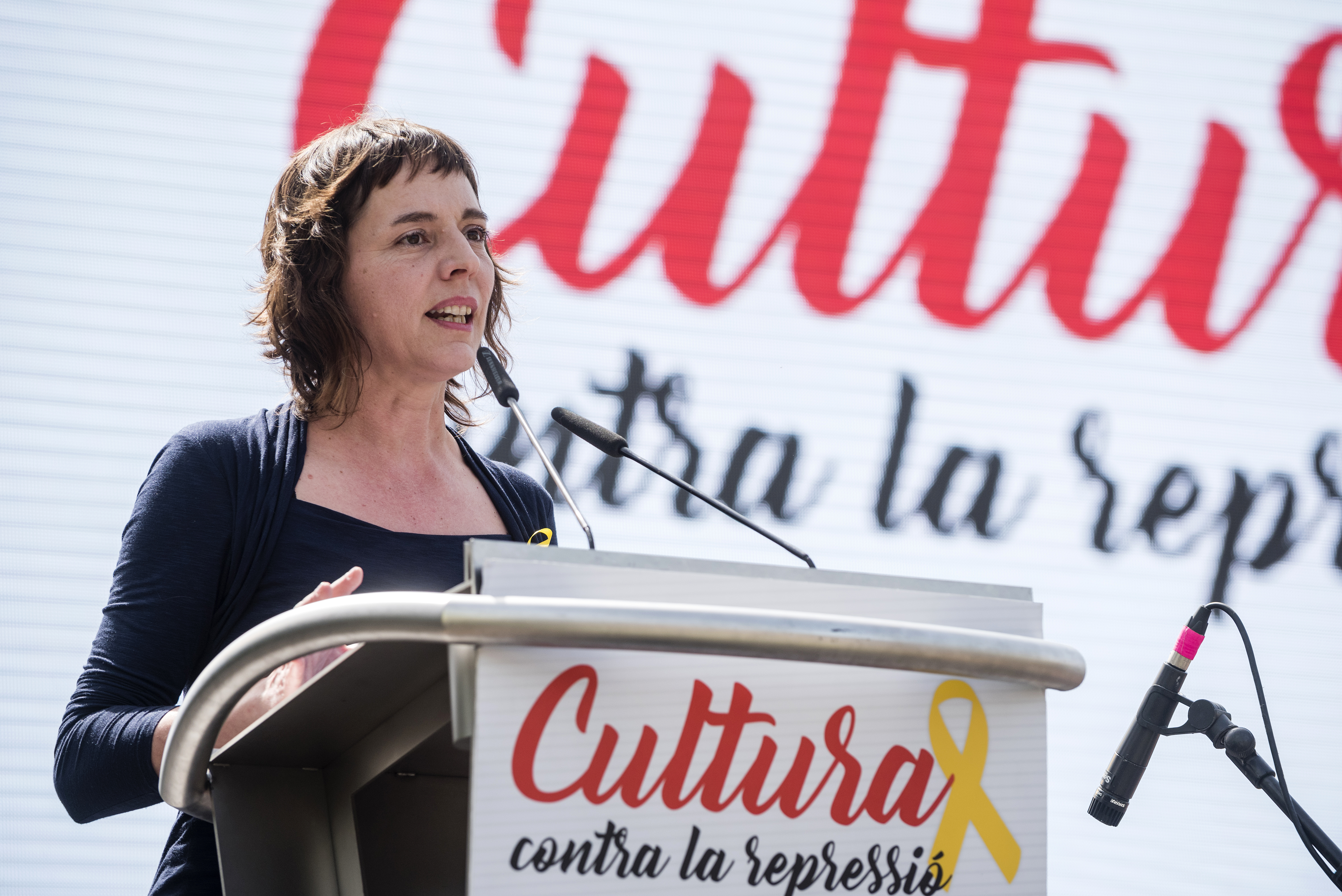 _DC72771